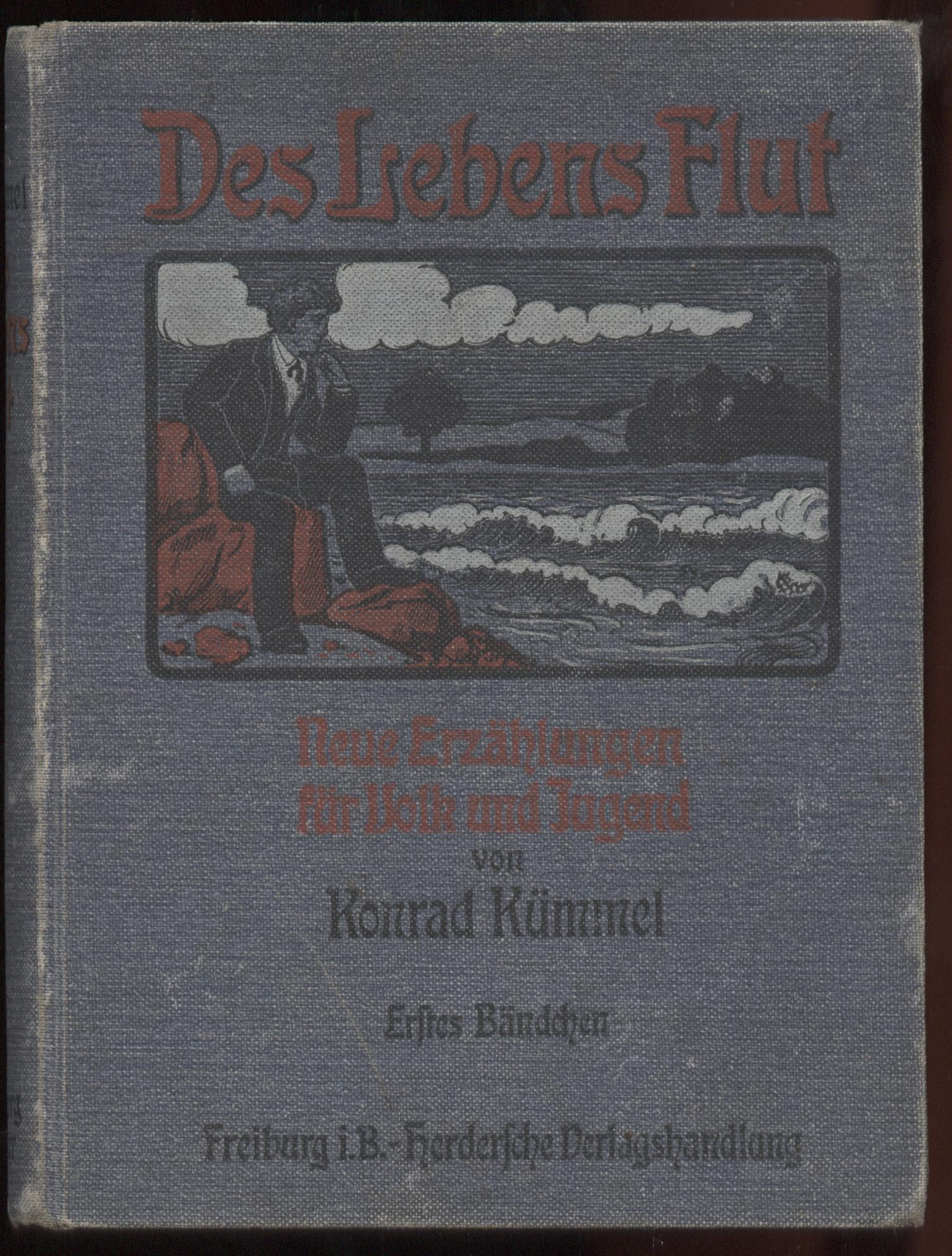 Konrad Kümmel, Priester und Volksschriftsteller, Bucheinband